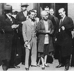 Cook esce dal carcere